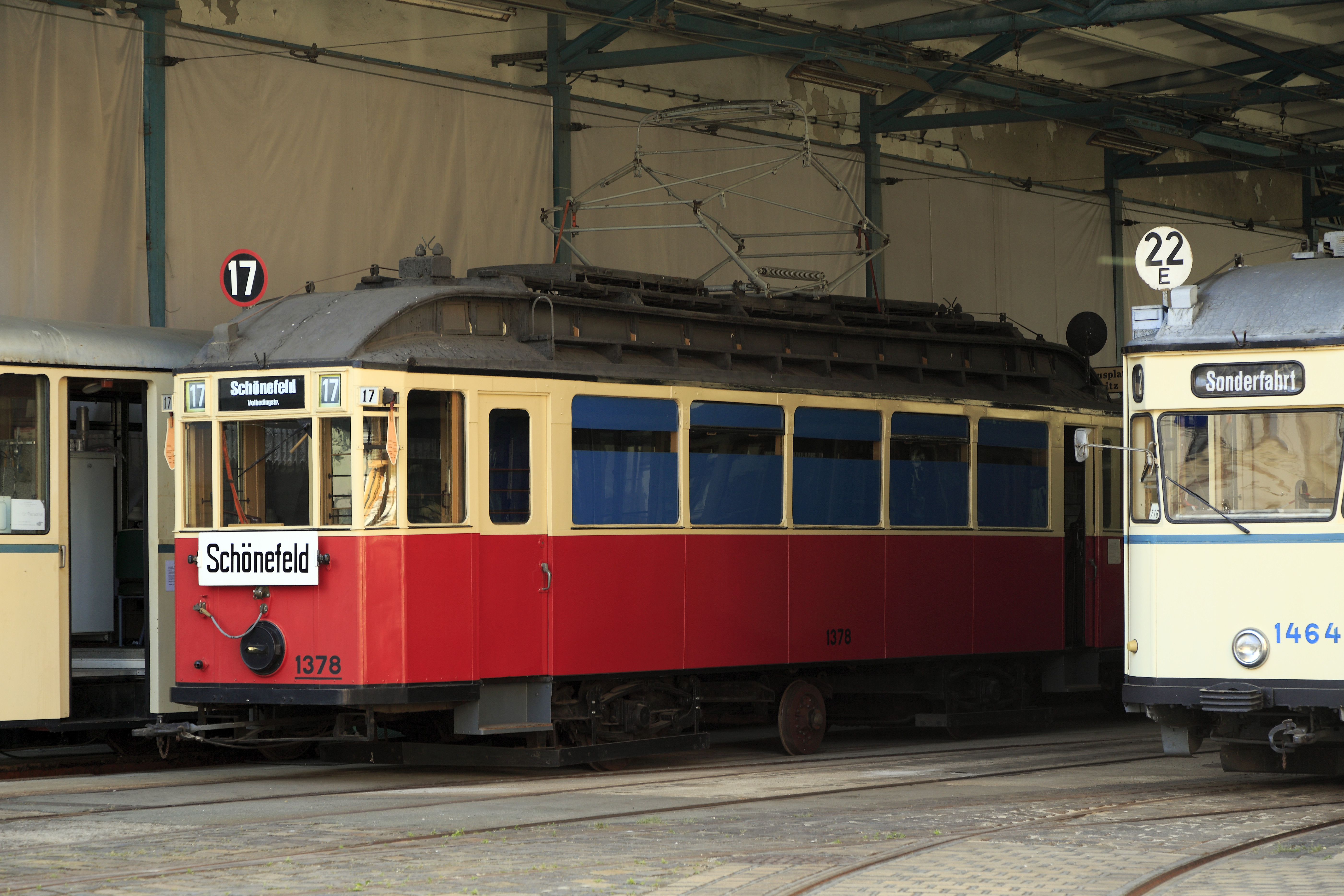 Lenkdreiachser Typ 24a, 1943 umgebaut aus dem LAAG-Maximumtriebwagen 1, Typ 24. Der Wagen wurde in den Zustand von 1943 gebracht. Die Scheinwerfer sind mit Tarnaufsätzen abgeblendet, die Seitenscheiben bis auf einen schmalen Streifen blau abgedeckt. Die Zielschild- und Liniennummernfilme sind negativfarbig weiß auf schwarz. Dabei zeigte sich, dass diese Beschriftung auch ohne Verdunkelungsbedingungen besser zu lesen sind. Deswegen wurden sie auch nach Kriegsende beibehalten. Auch die Kopfscheibe ist negativfarbig, der rote Ring kennzeichnet Linien, die den Hauptbahnhof bedienten. Auffällig sind die primitiven mechanischen Richtungsanzeiger, die abfällig »Eselsohren« genannt wurden.